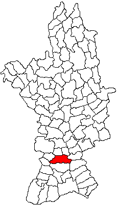 Categorie:Hărţi ale judeţului Olt